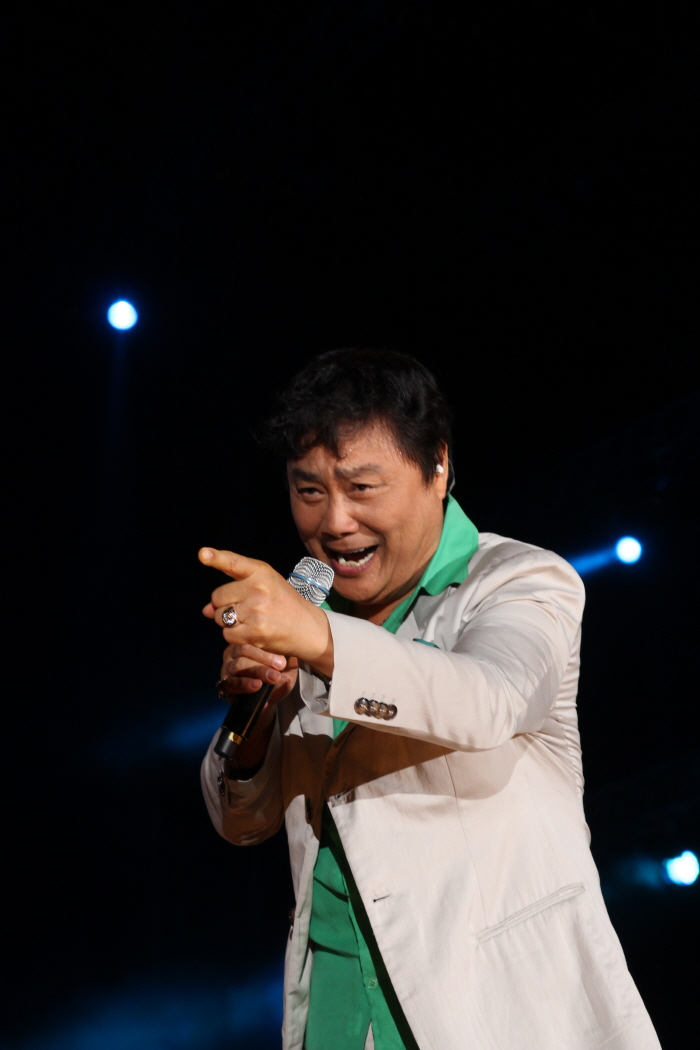 가수 남진